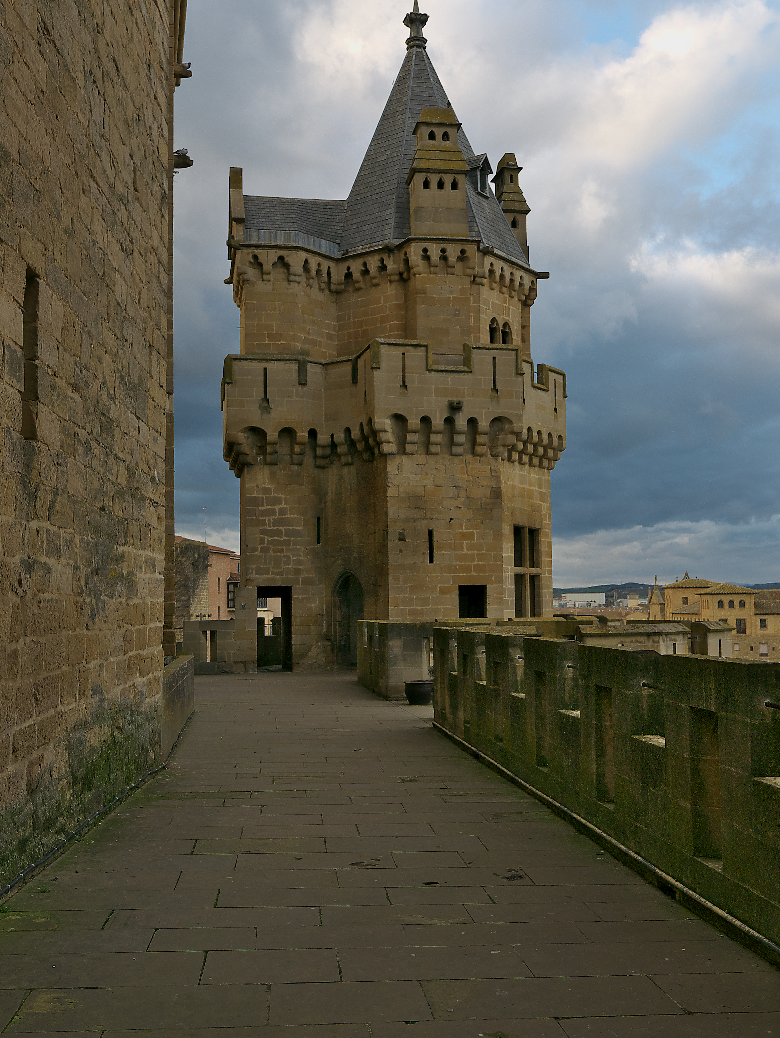 Torre de planta octogonal.